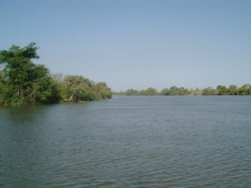 L'illa de Baboon en el riu Gàmbia (borr) (act) 16:00 23 abr, 2005 . . Jolle (23951 octets) (L'illa de Baboon en el riu Gàmbia )